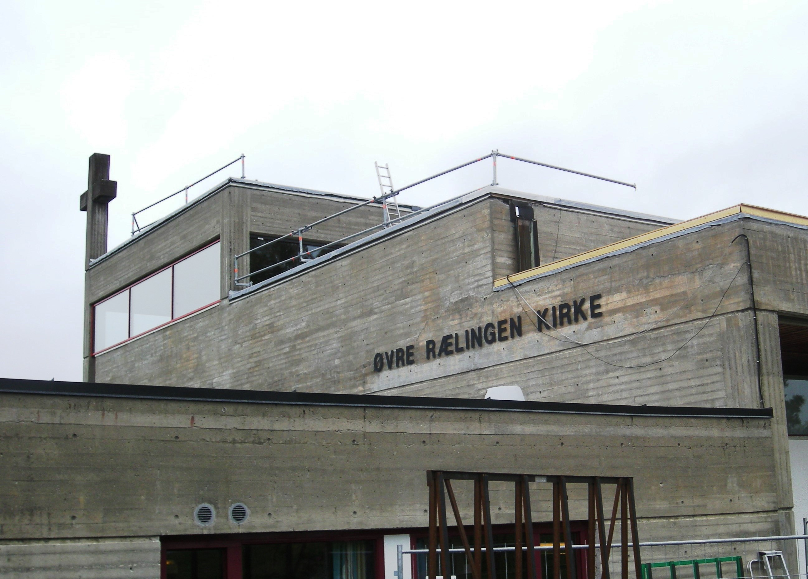 Øvre Rælingen kirke